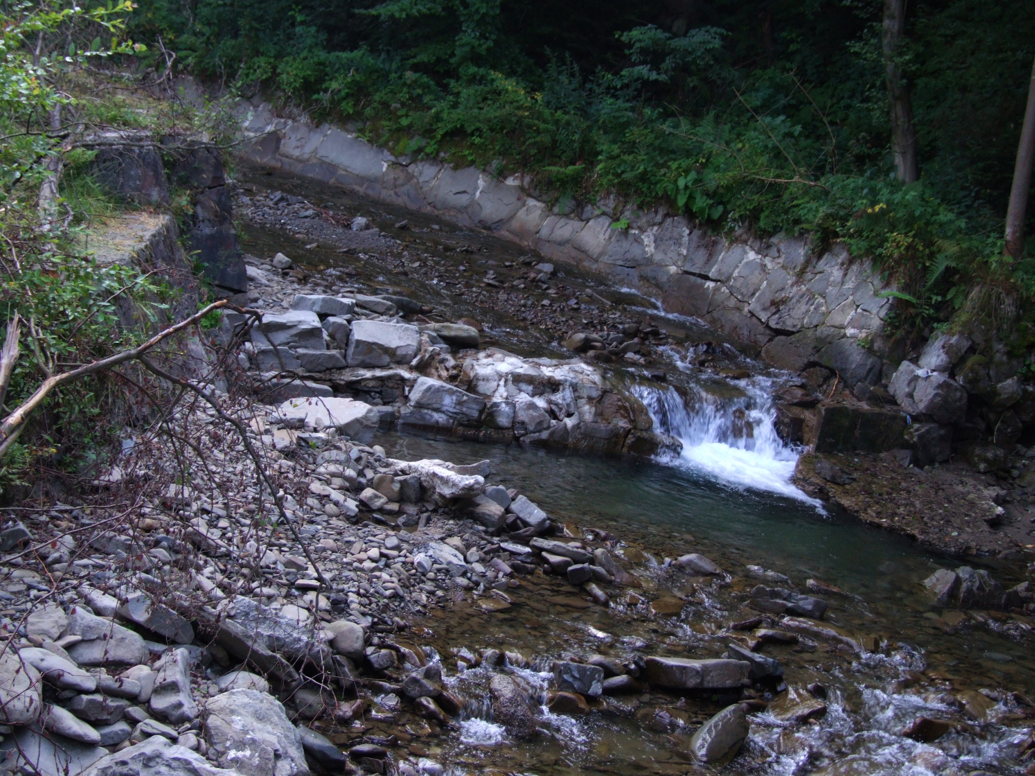 Potok Łomniczanka